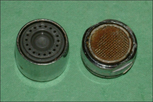 Water nozzle -- outside part. -- Außenseite eines Strahlreglers. Links Strahlregler mit Kunststoffeinsatz und metrischem Innengewinde (22mm); rechts Strahlregler aus Metall und metrischem Außengewinde (22mm).